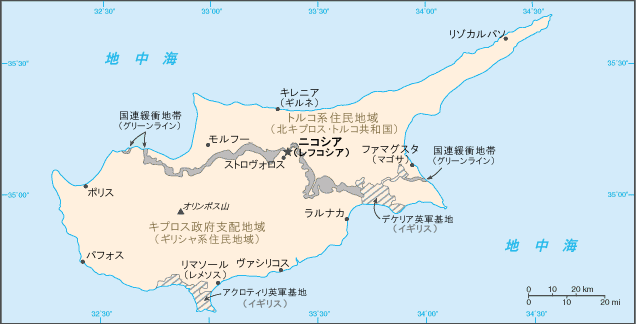 キプロス地図 - CIA Factbookより日本語化 掲載地名: アクロティリ英軍基地、ヴァシリコス、オリンポス山、北キプロス・トルコ共和国、キプロス政府支配地域、ギリシャ系住民地域、ギルネ、キレニア、グリーンライン、国連緩衝地帯、ストロヴォロス、デケリア英軍基地、トルコ系住民地域、ニコシア、パフォス、ファマグスタ、ポリス、マゴサ、モルフー、ラルナカ、リゾカルパソ、リマソール、レフコシア、レメソス